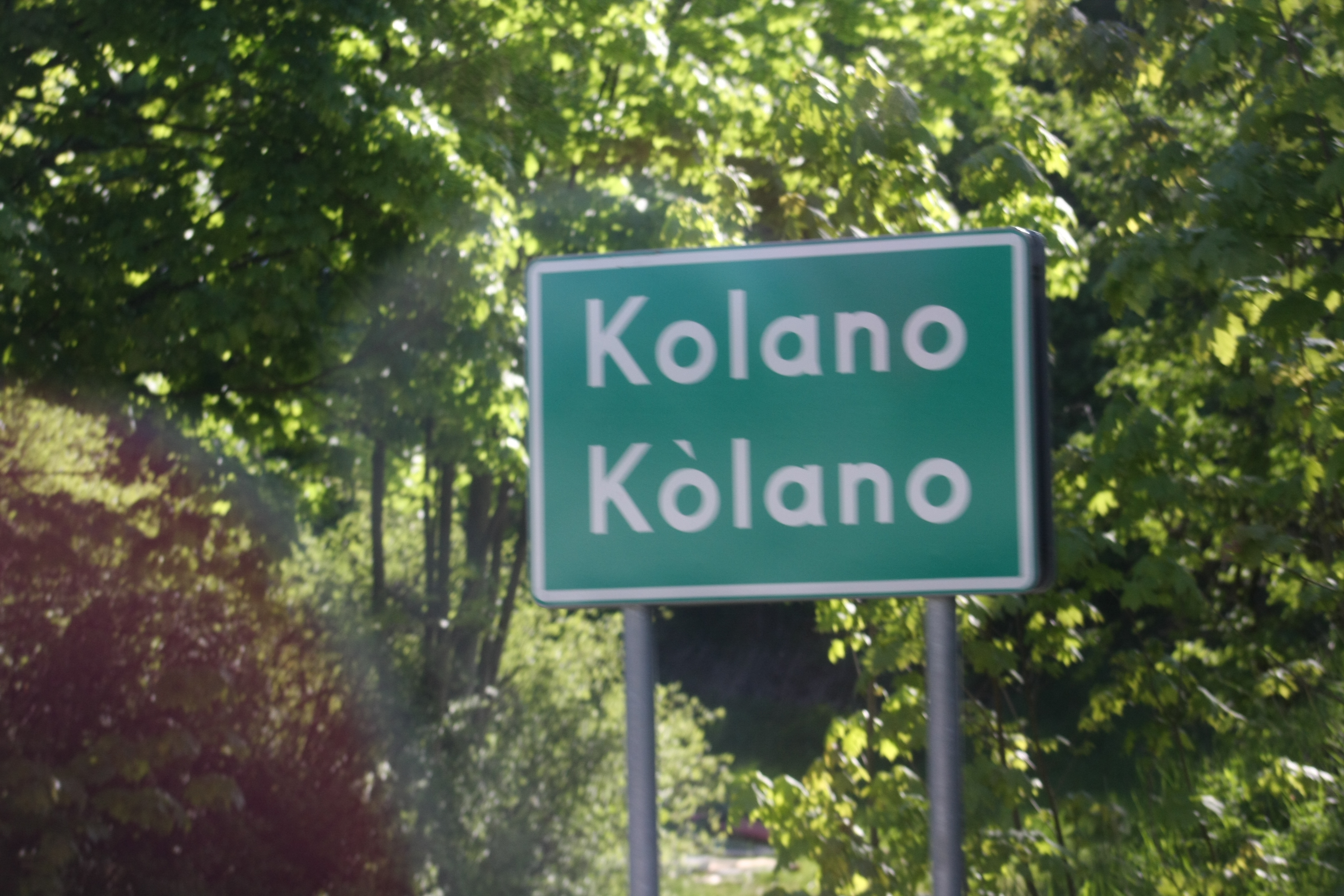 Dwujęzyczna tablica z nazwą przed wjazdem do wsi Kolano